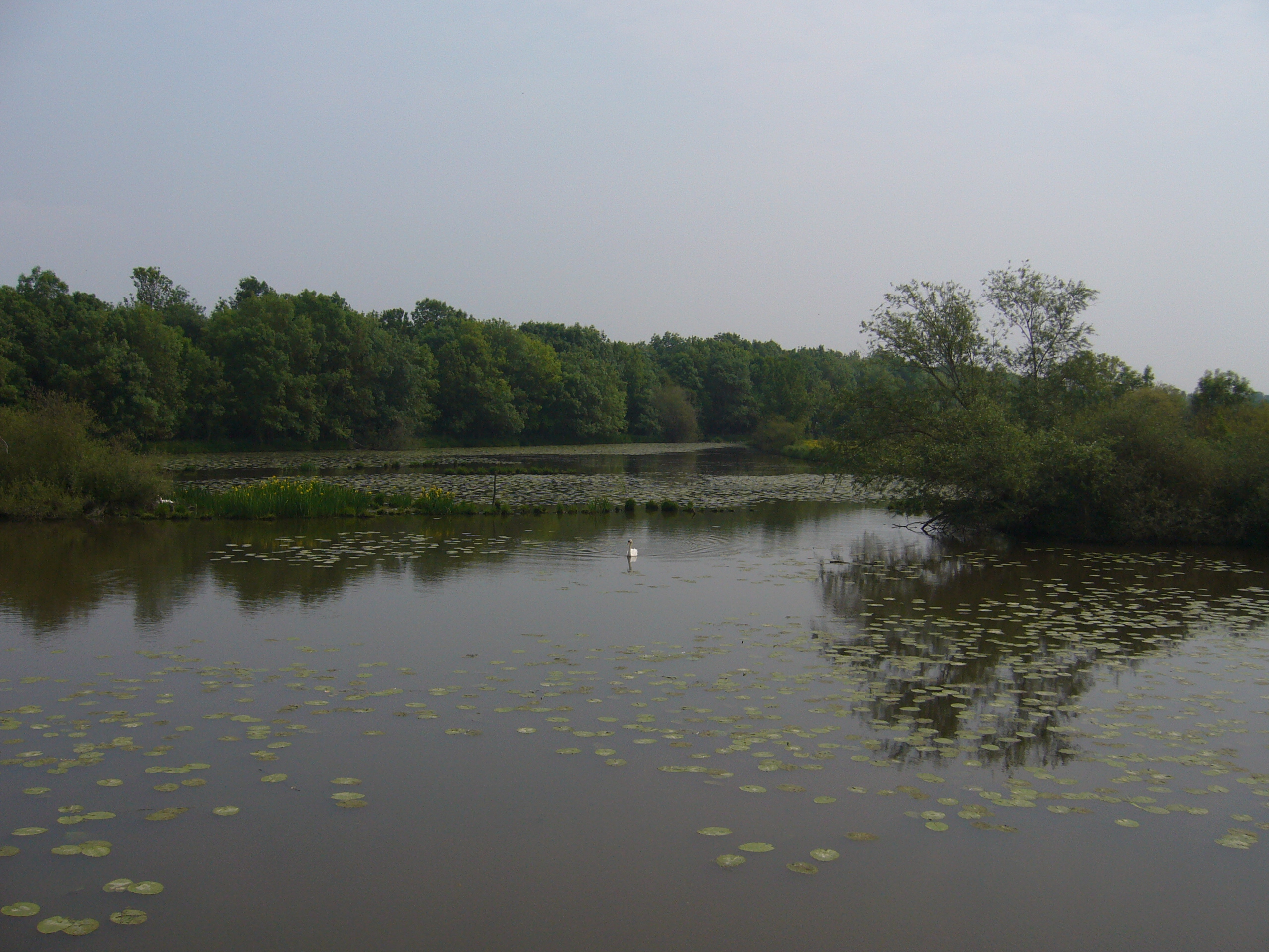 La boire de Champtocé avec sa flore et sa faune.